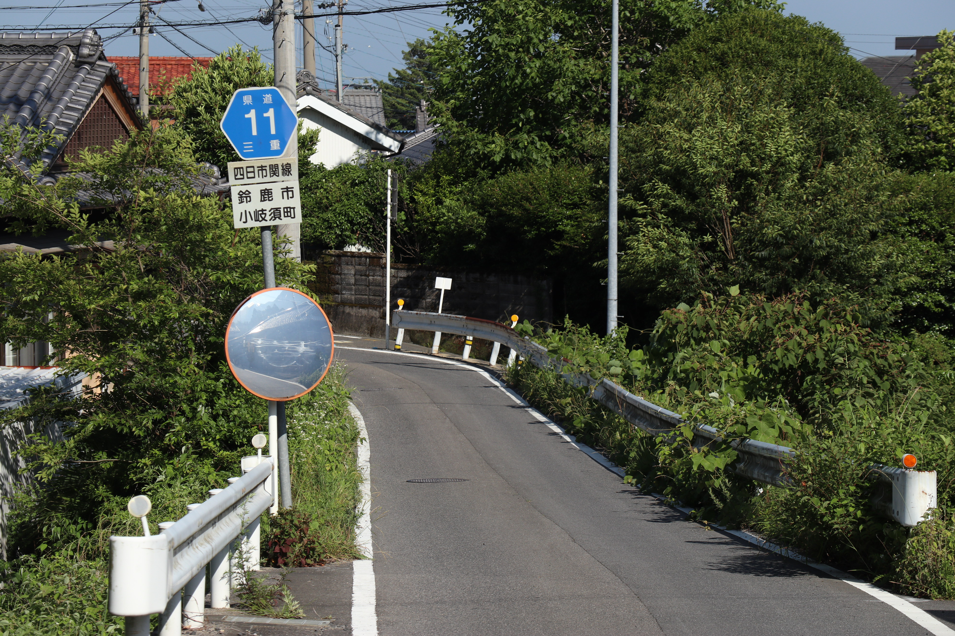 三重県道11号四日市関線,三重県鈴鹿市小岐須町